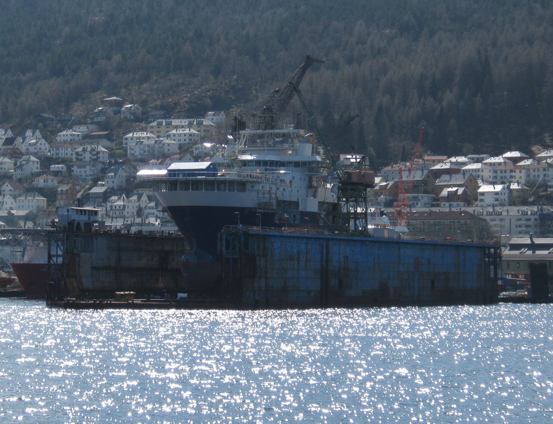 Tørrdokk ved Bergen Mekaniske Verksted på Laksevåg i Bergen